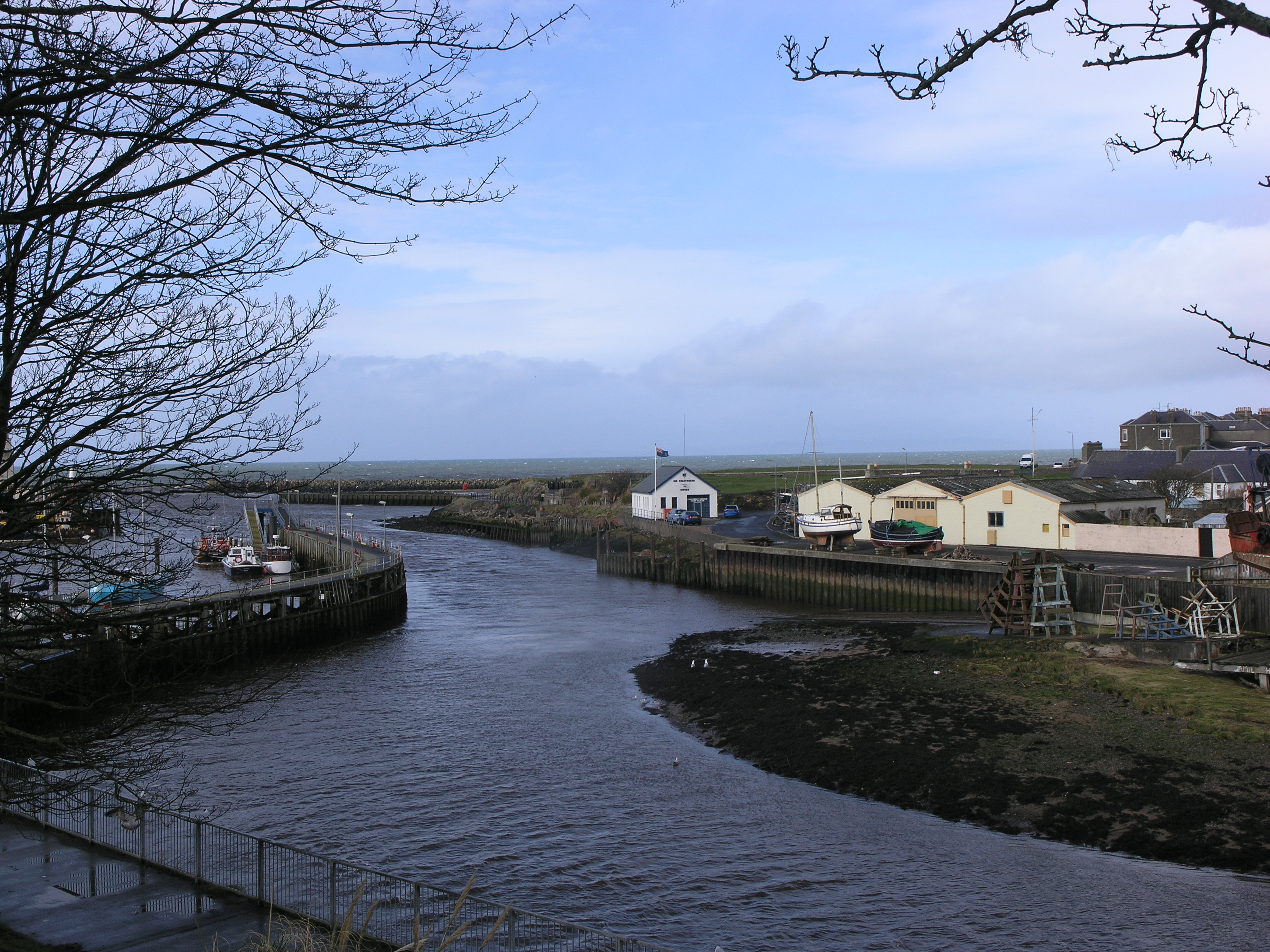 Harbour in Girvan